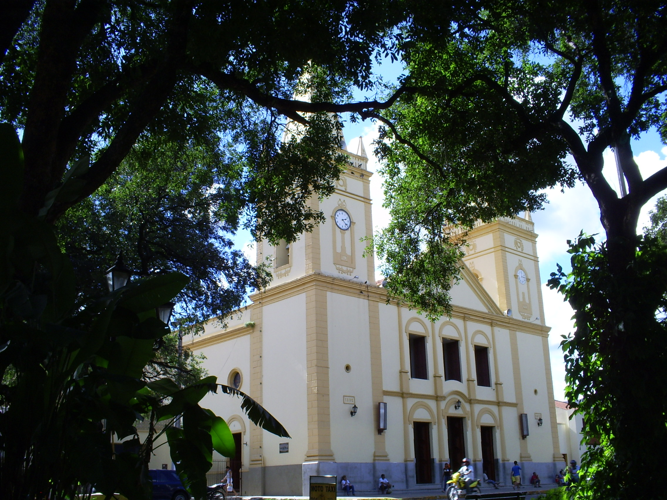 Matriz de Crato, Ceará